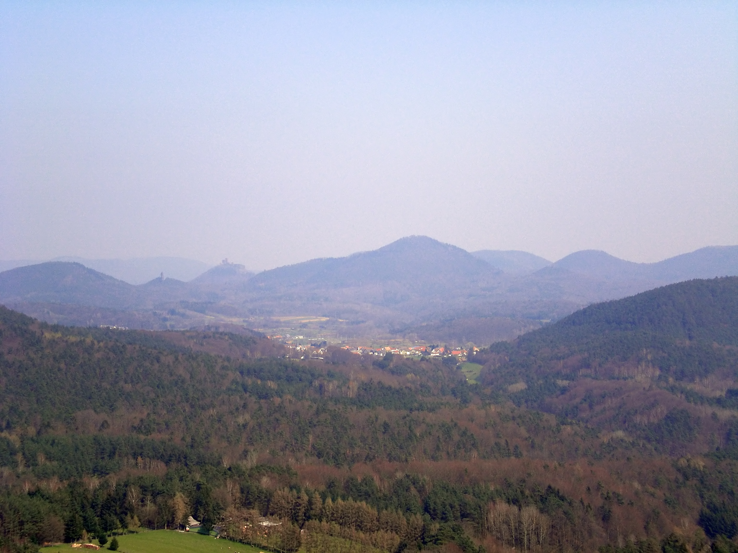 Blick von Lindelbrunn in Richtung Gossersweiler